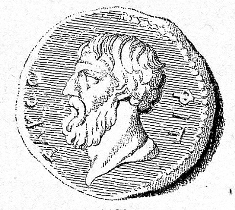 Pittakos van Mitylene uit Baumeister: Denkmäler des klassischen Alterums III (1888), p. 1333.